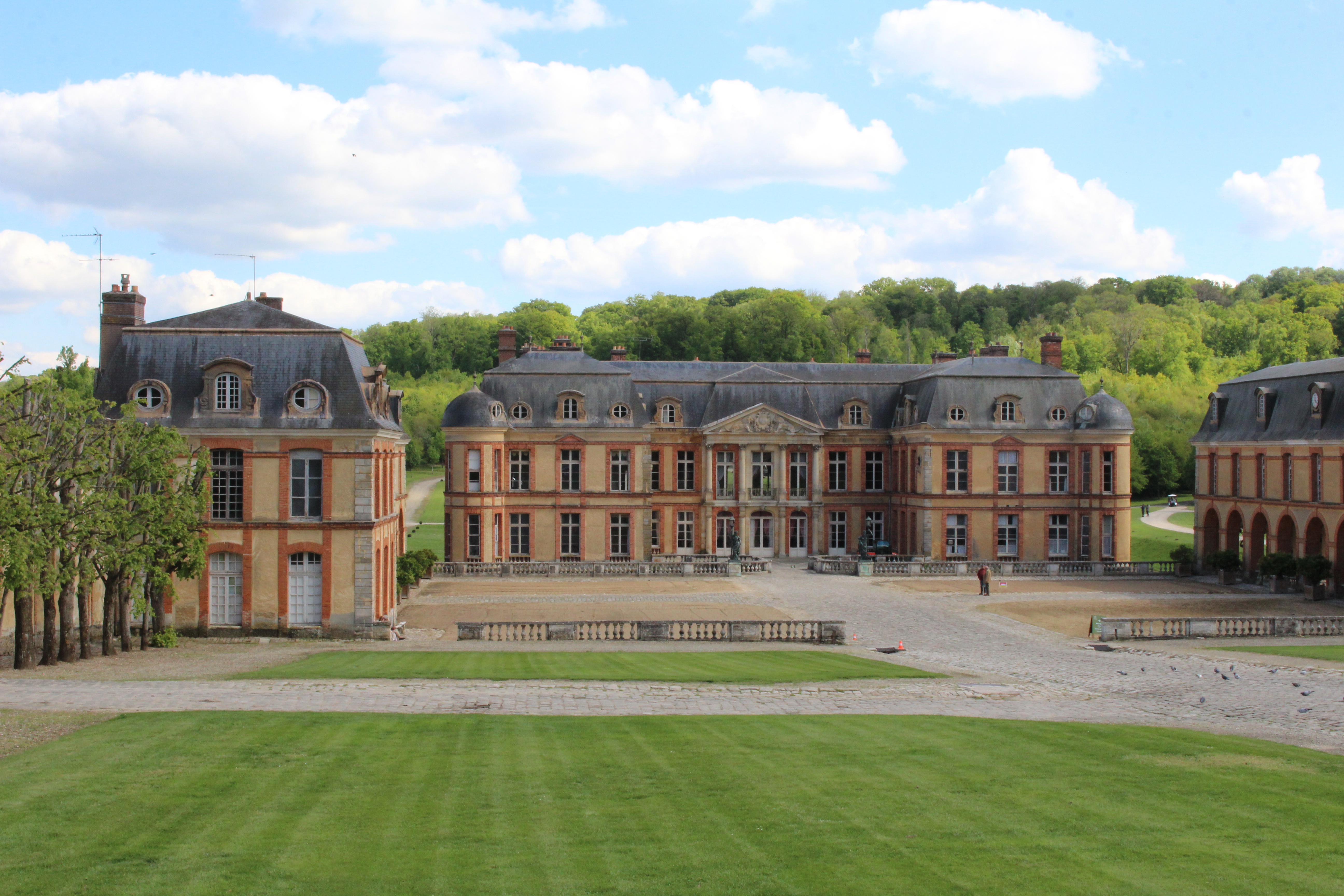 Château de Dampierre, Dampierre-en-Yvelines.